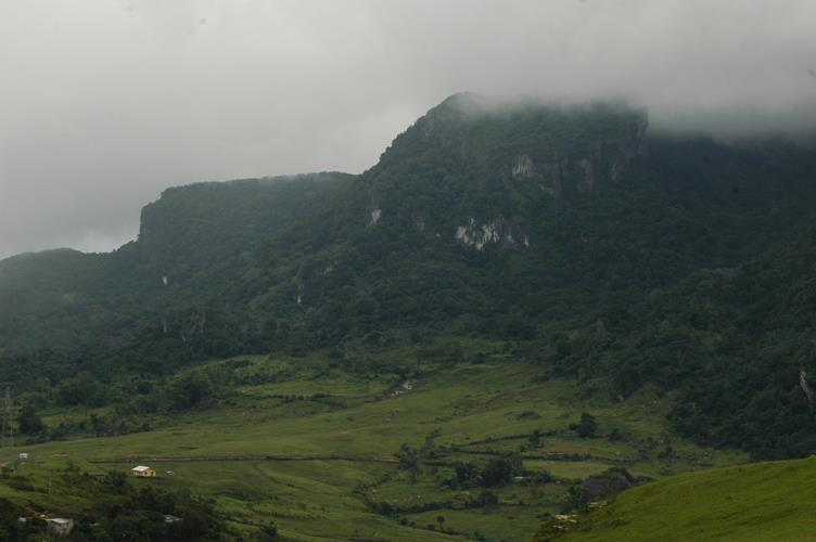 Monte Mundo Perdido, suco Ossu de cima, Osttimor